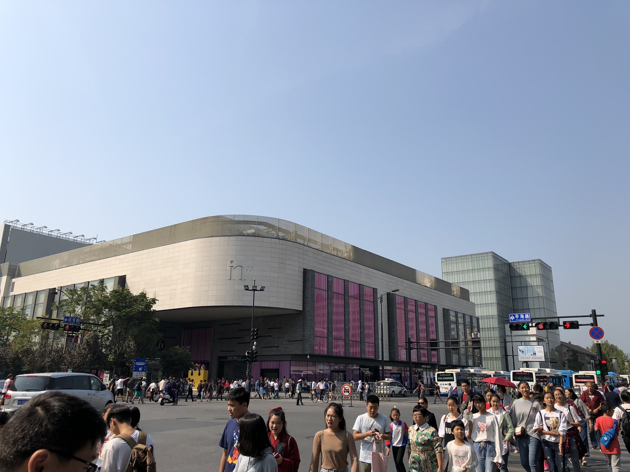 中文（中国大陆）: 国庆节假期期间的杭州湖滨银泰A区和D区